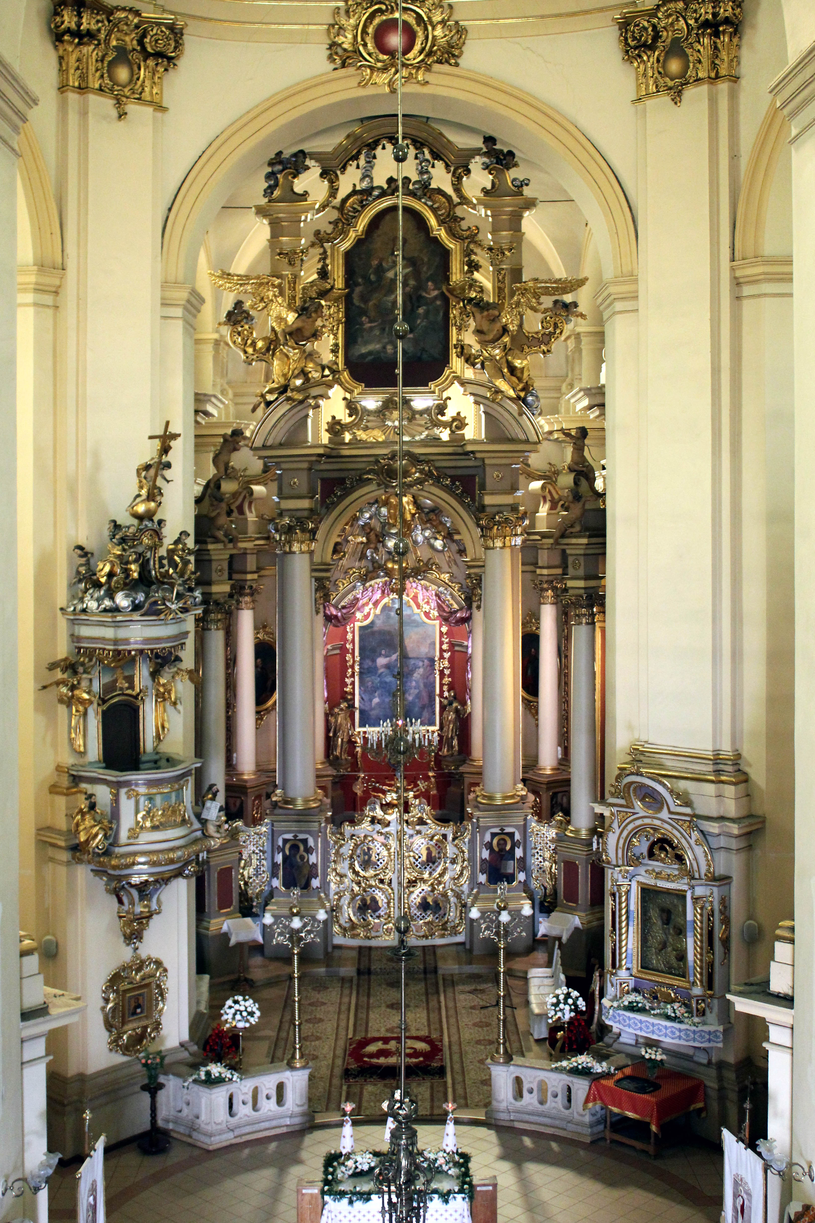 Вівтар собору святого Юра у Львові.